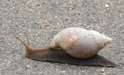 Achatina/Riesenschnecke im Kruger National Park (Südafrika)